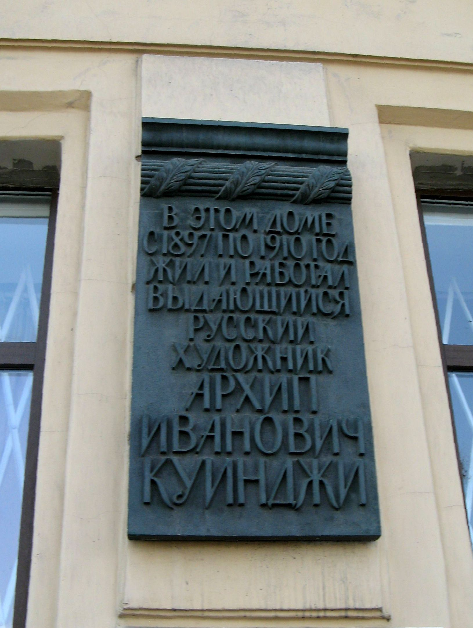 Мемориальная доска художнику А. И. Куинджи в Санкт-Петербурге (Волховский пер., д. № 2)